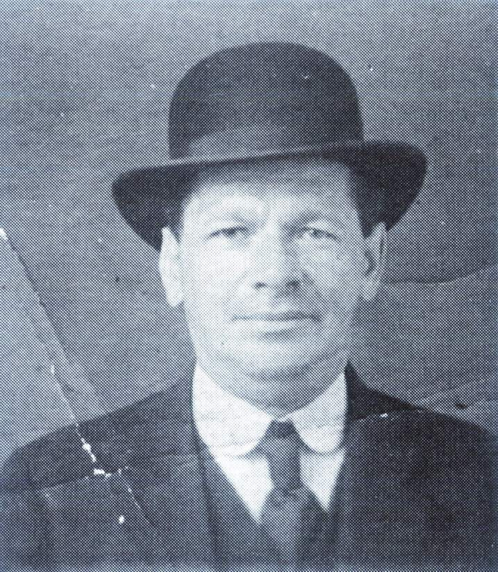 Повар Иван Харитонов